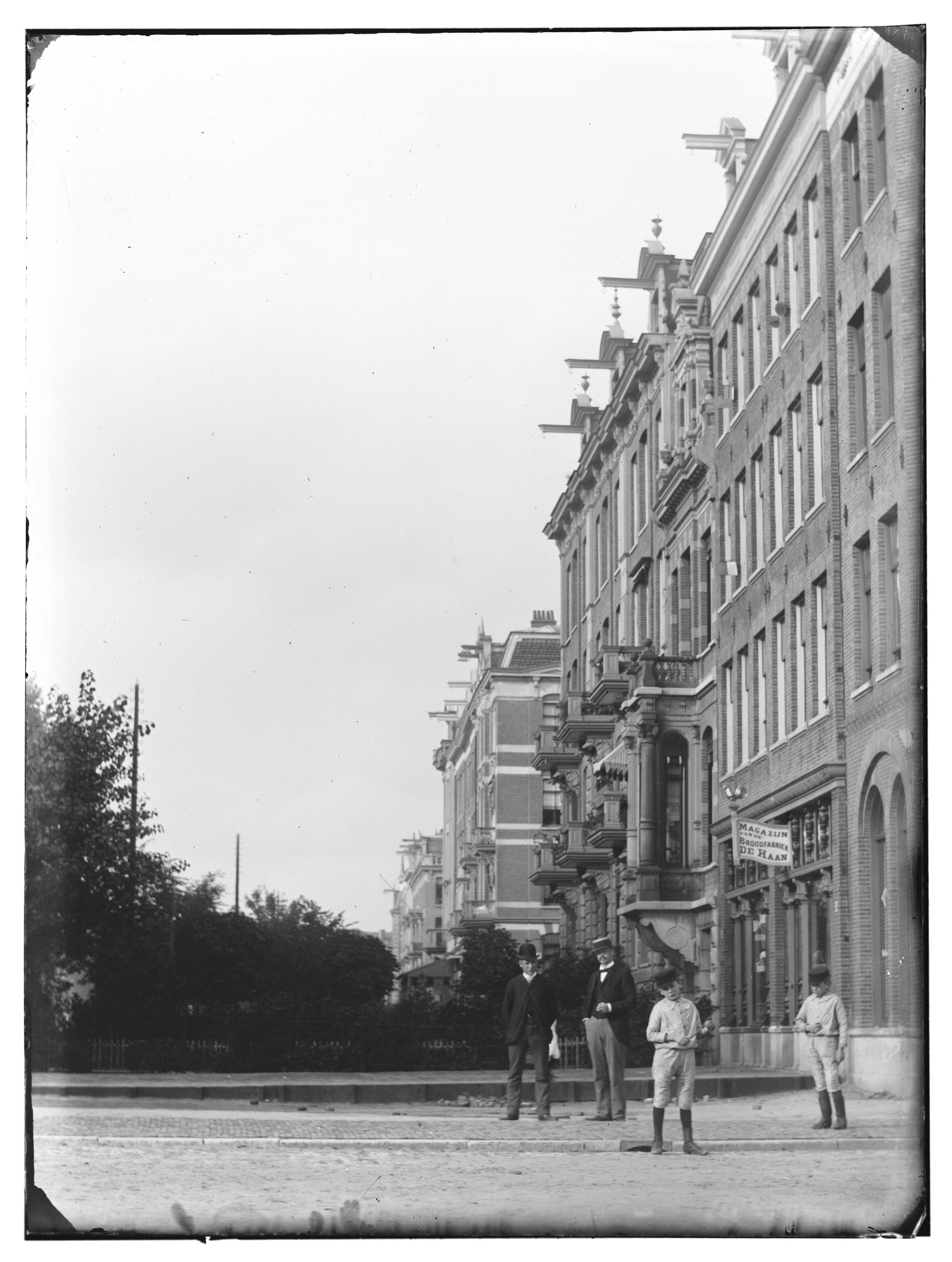 Beschrijving De Jongens Olie staande voor Linnaeusstraat 31 Gezien vanaf de hoek van de Eerste Van Swindenstraat naar de Mauritskade. Rechts de ingang van de Wagenaarstraat. Documenttype foto Vervaardiger Olie``, Jacob (1834-1905) Collectie Collectie Jacob Olie Jbz. Datering 1892 Geografische naam Linnaeusstraat Inventarissen Afbeeldingsbestand 010019000327 Generated with Dememorixer